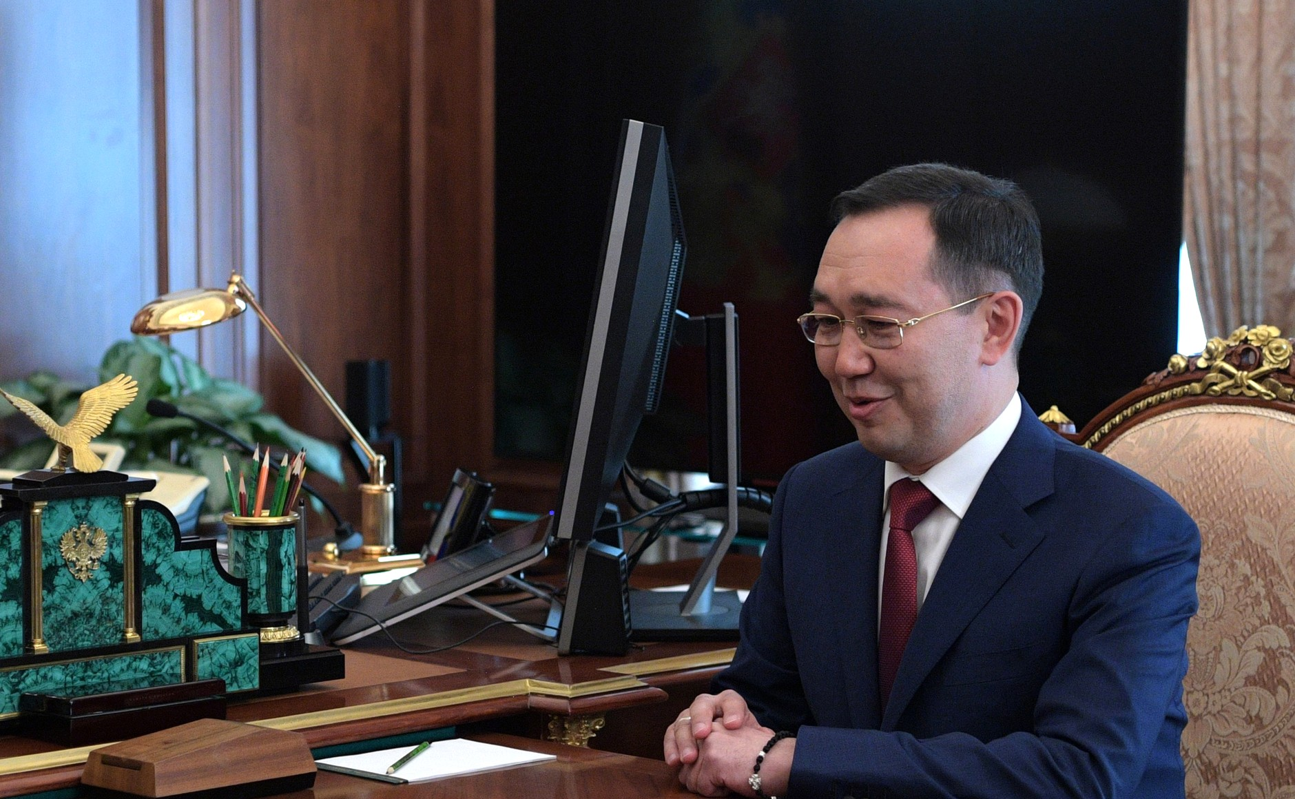 Рабочая встреча с Айсеном Николаевым. Президент подписал Указ о назначении А. Николаева временно исполняющим обязанности Главы Республики Саха (Якутия).